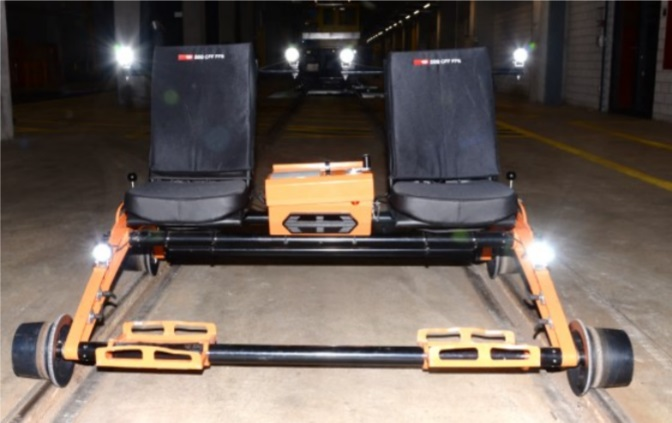 Die Draisine vom Typ Mimosa ist ein faltbares und transportables Fahrzeug mit einem Gewicht von 65 kg, das von einem Elektromotor angetrieben wird und zwei Personen Platz bietet. Zwei solcher Draisinen waren bei den SBB im Einsatz.